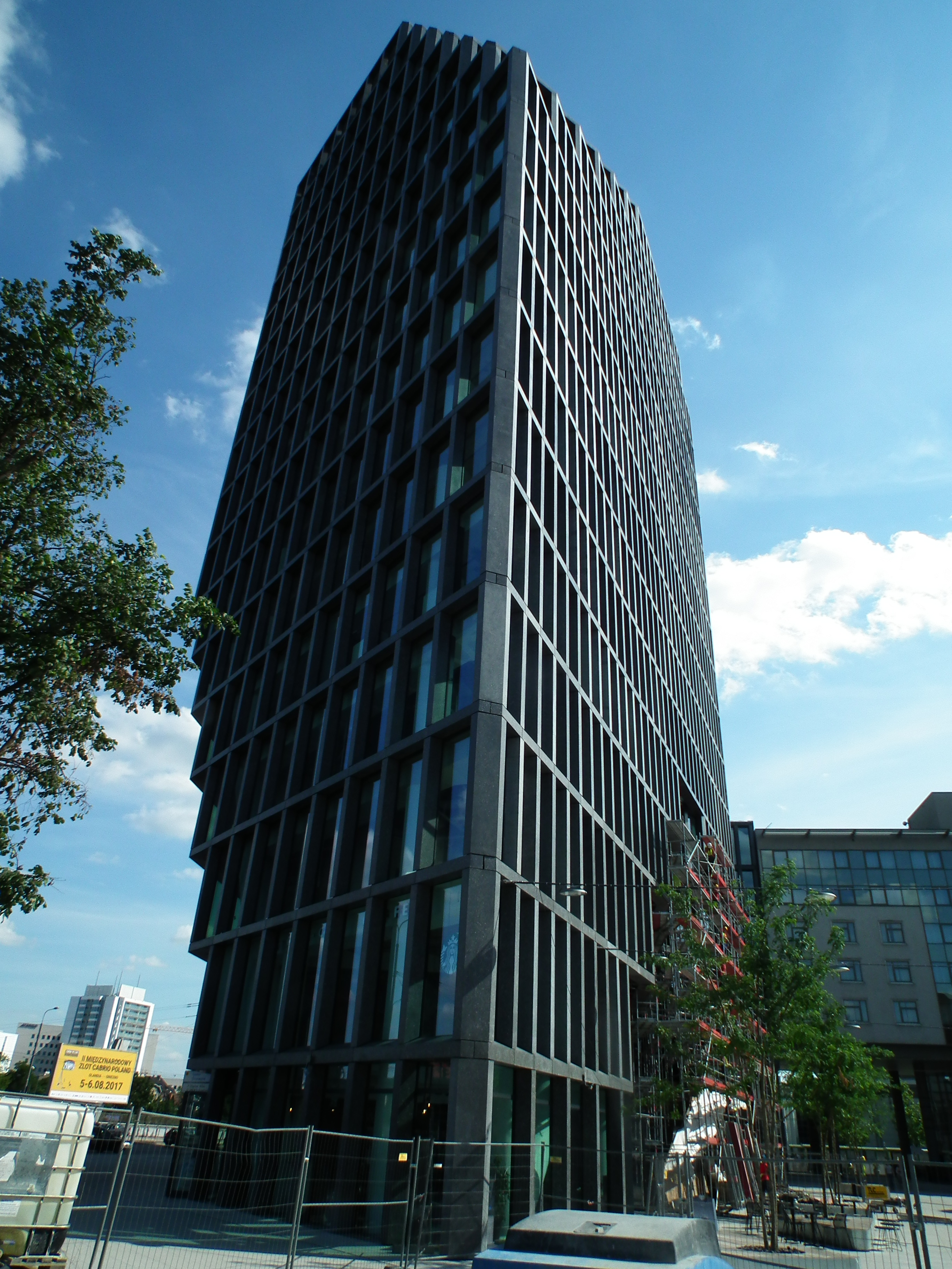 22 Roosevelta Street in Poznań. Nowy Bałtyk.